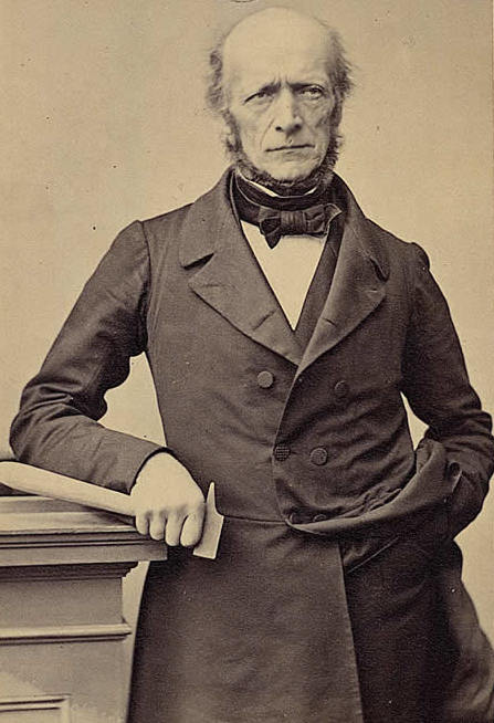 Swiss geologist Arnold Escher von der Linth (1807 - 1872)